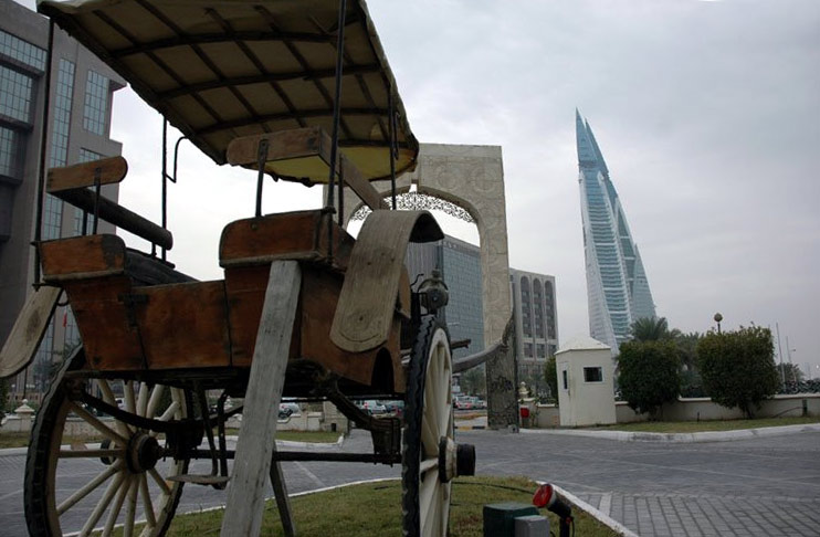 മനാമ, ബഹ്റൈനിന്റെ തലസ്ഥാന നഗരം